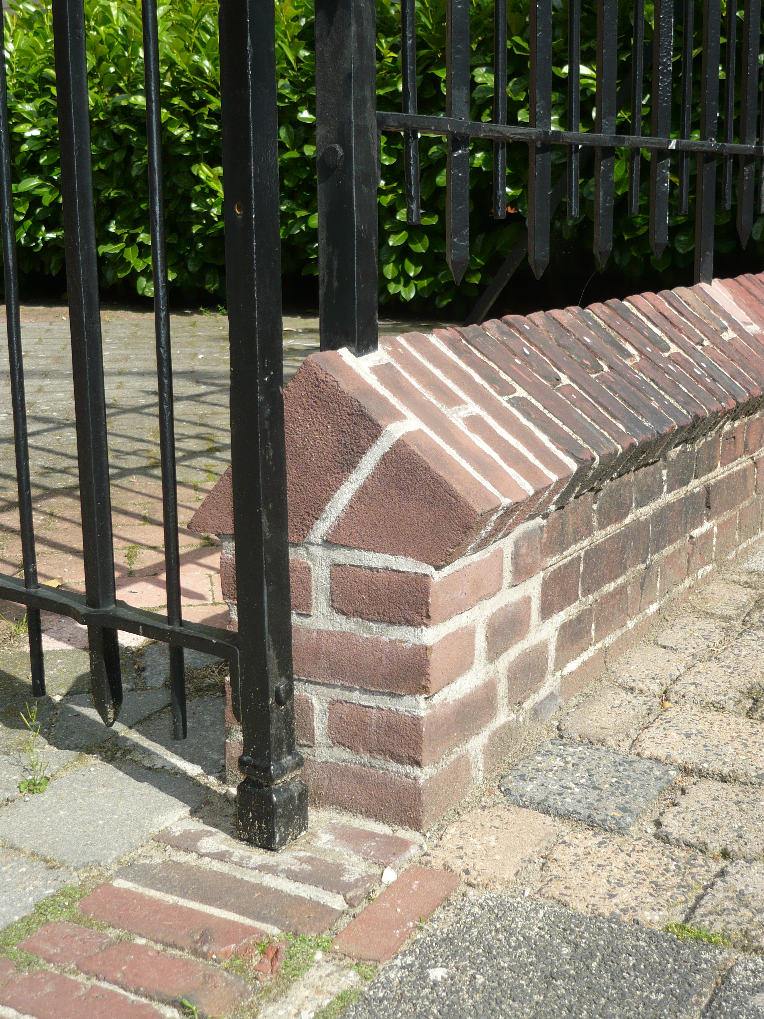 Ezelsrug